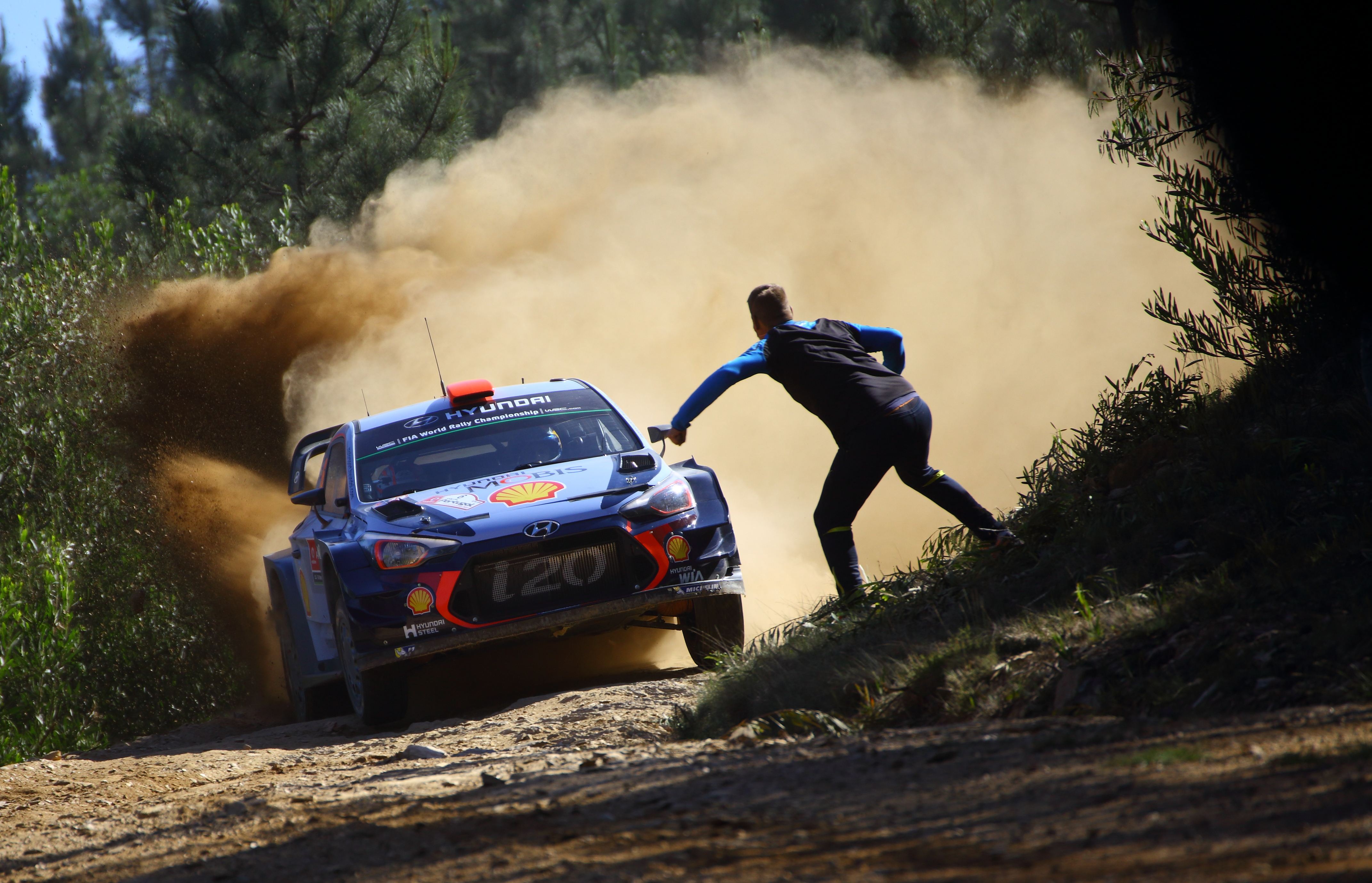 2017 Rally Portugal